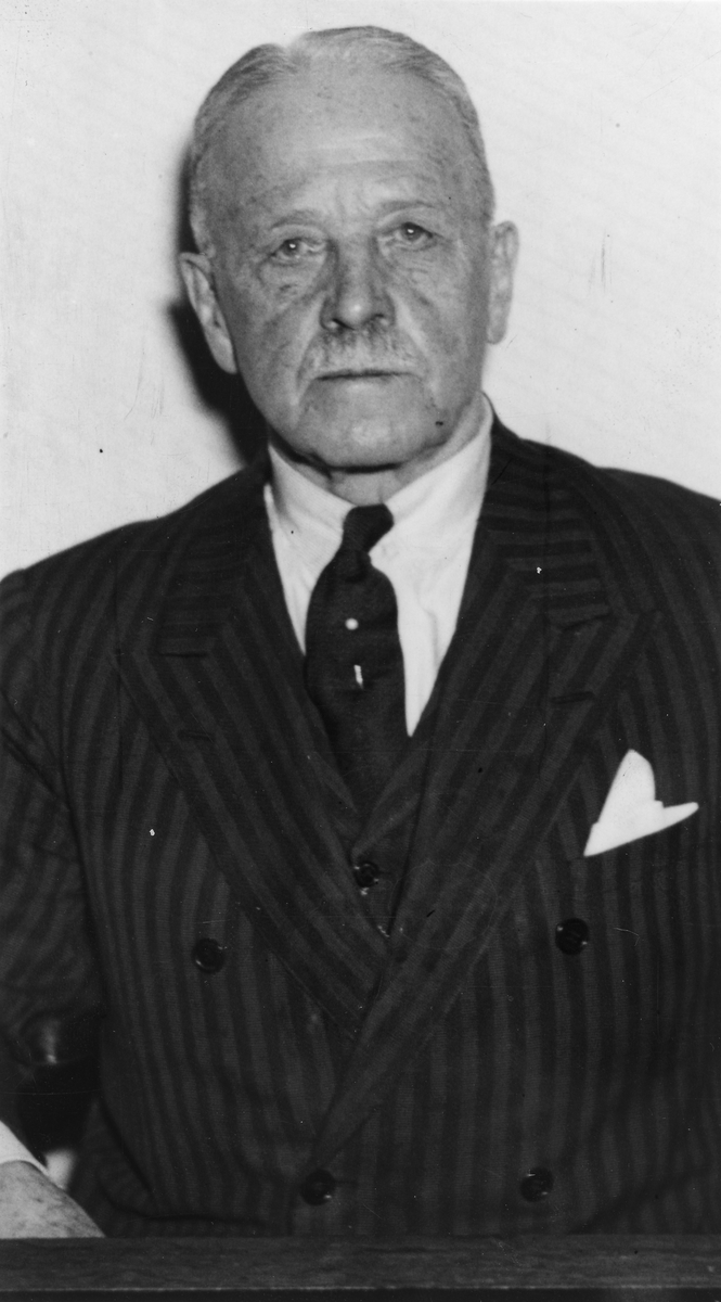 Ole Andreas Sverre (1865 - 1952 ) var en norsk arkitekt.